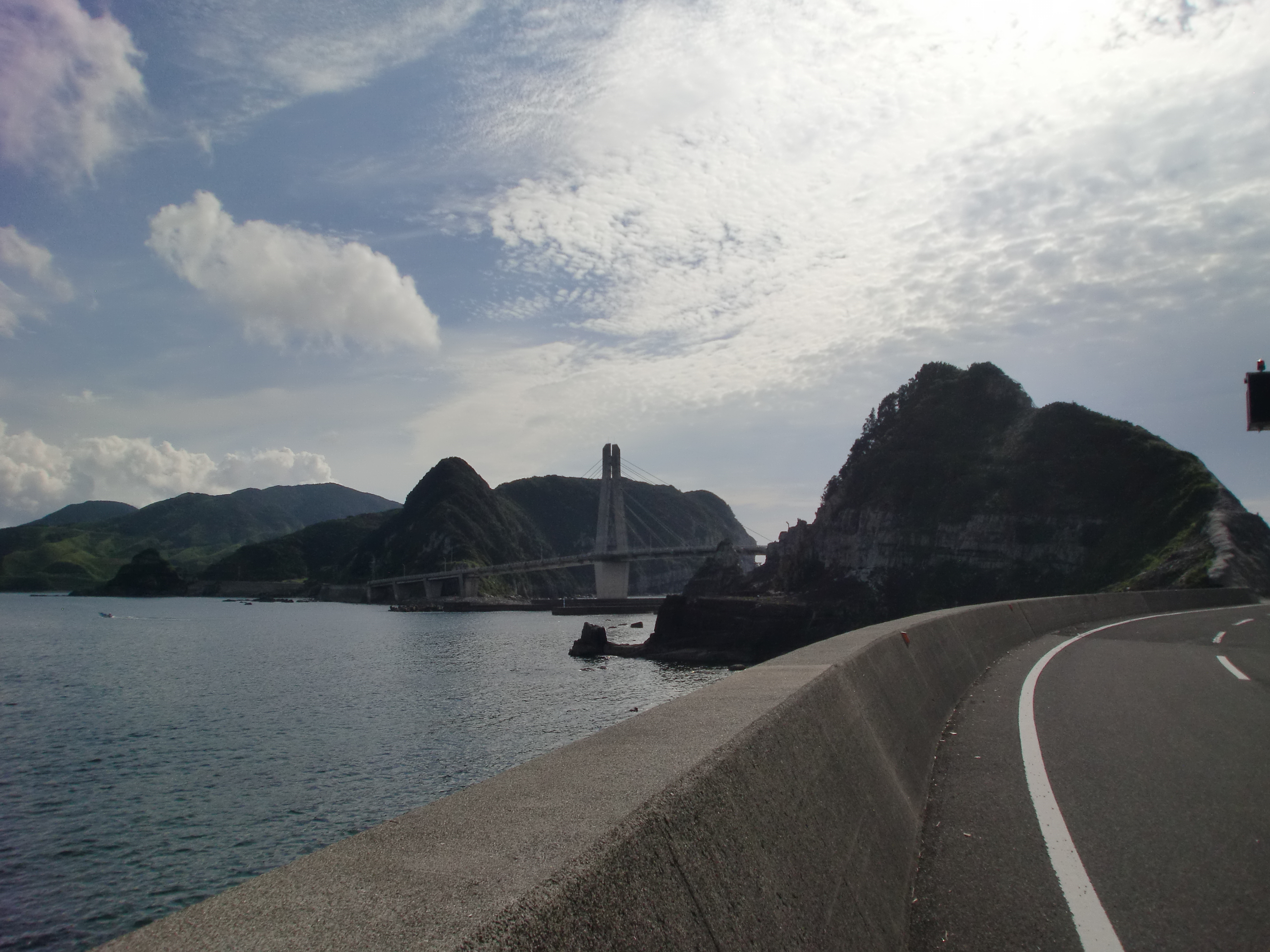 甑大明神橋を終点側から起点側に望む。